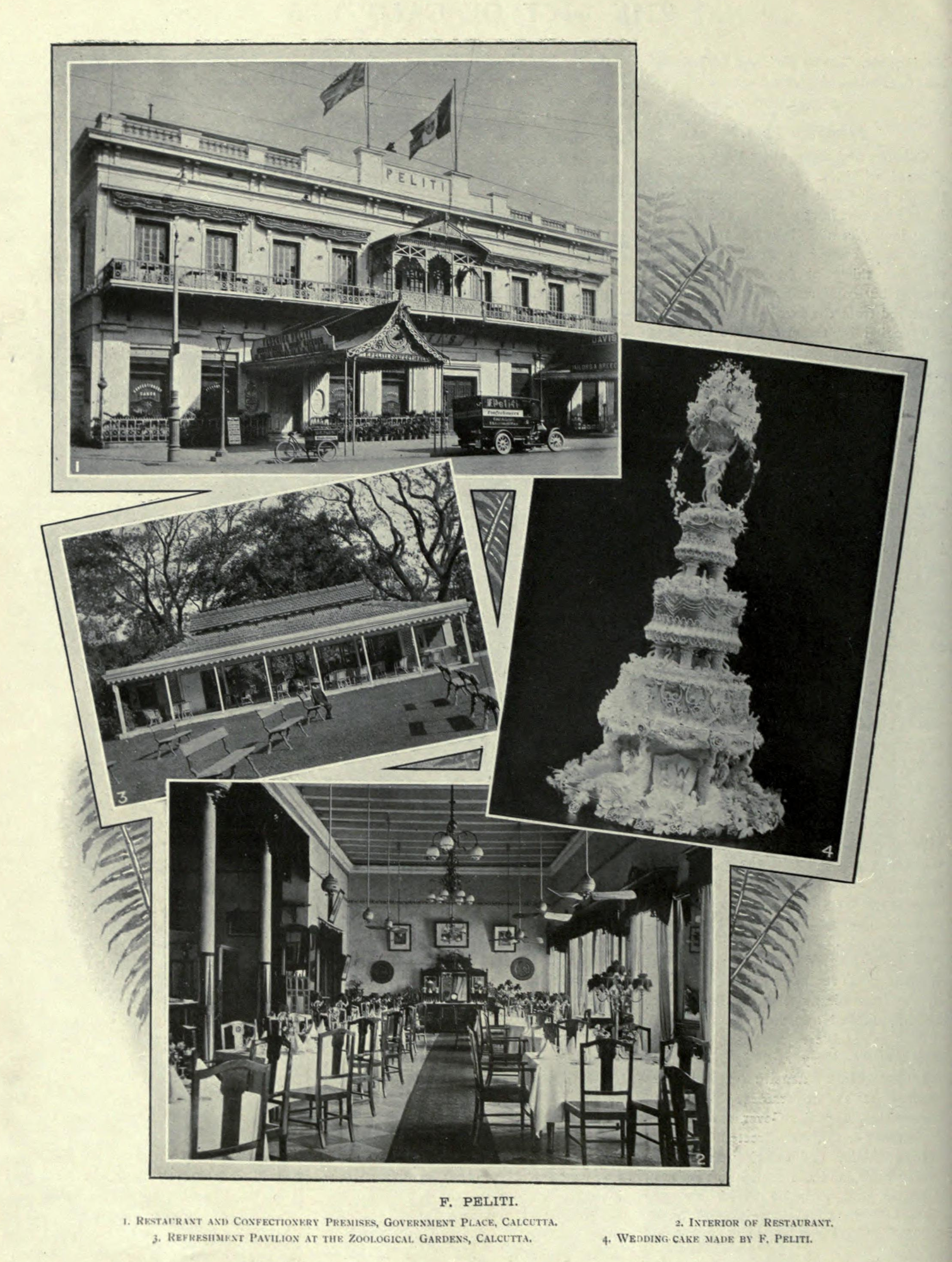 Restaurant of Federico Peliti at Calcutta c. 1917